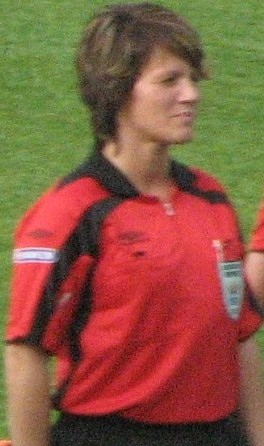 Ken Henry Johnsen, Hege Lanes Steinlund (t.v), Vibeké Larsen (t.h) dømte Bodø/Glimt-Sogndal i 2007Speaker.no